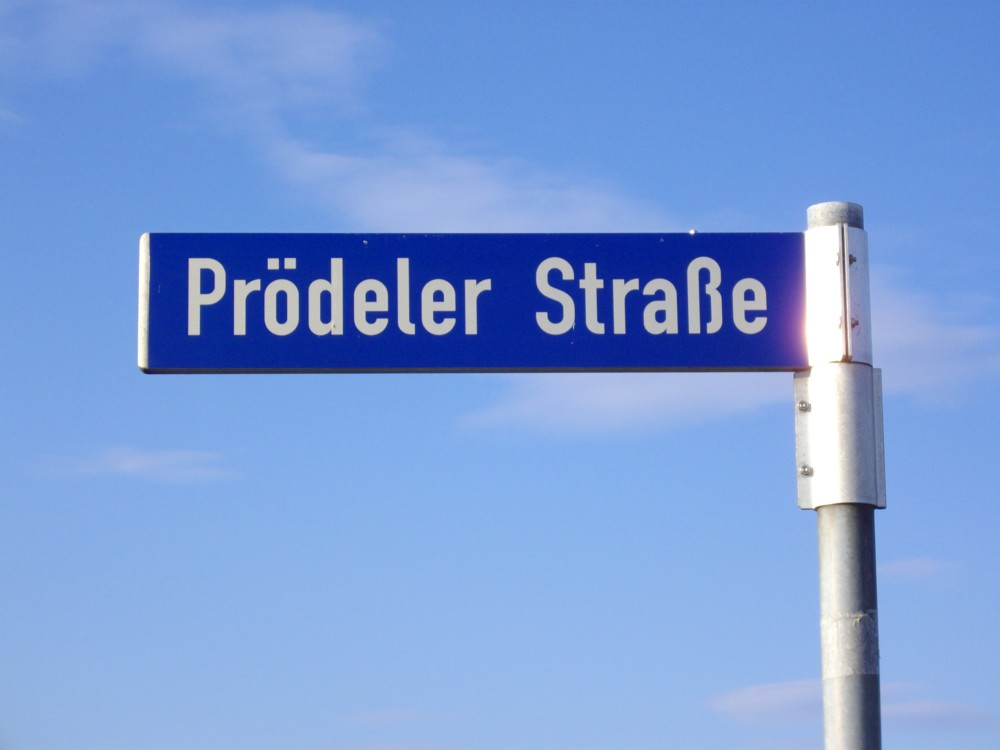 Prödeler Straße im Neubaugebiet Zöbigker bei Markkleeberg, Leipzig